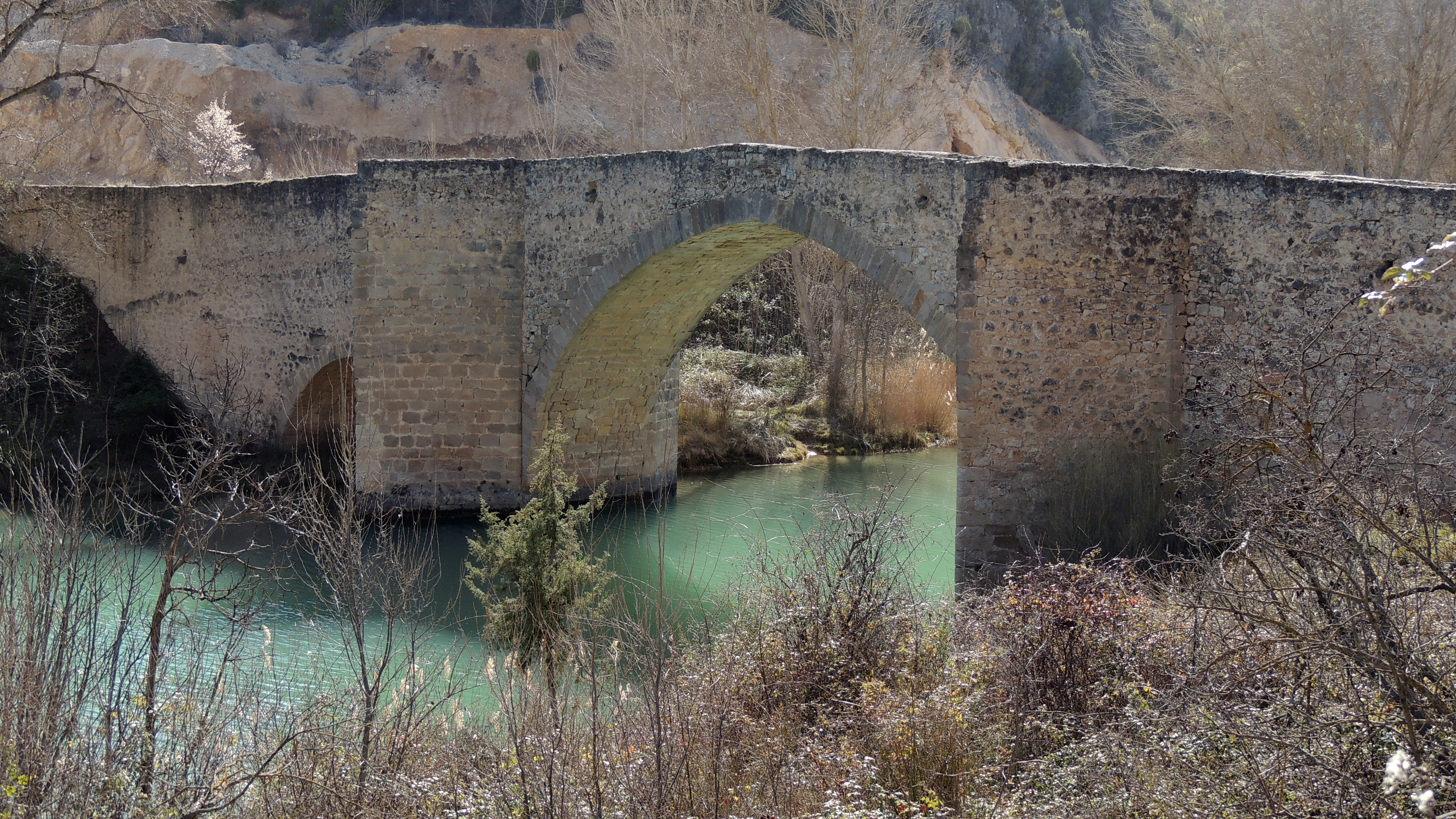 Puente sobre el río Tajo